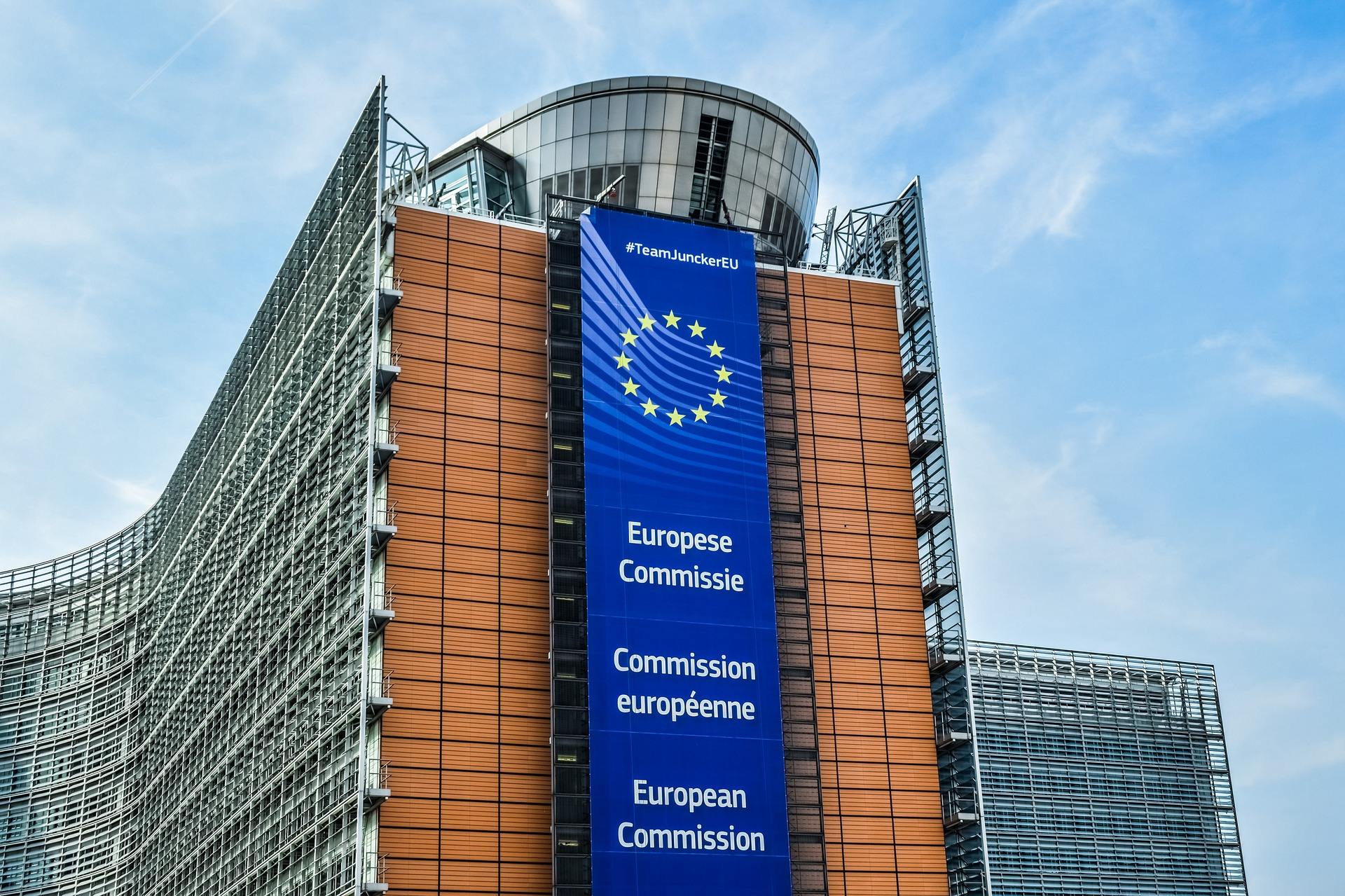 Euroopa Komisjoni hoone Brüsselis